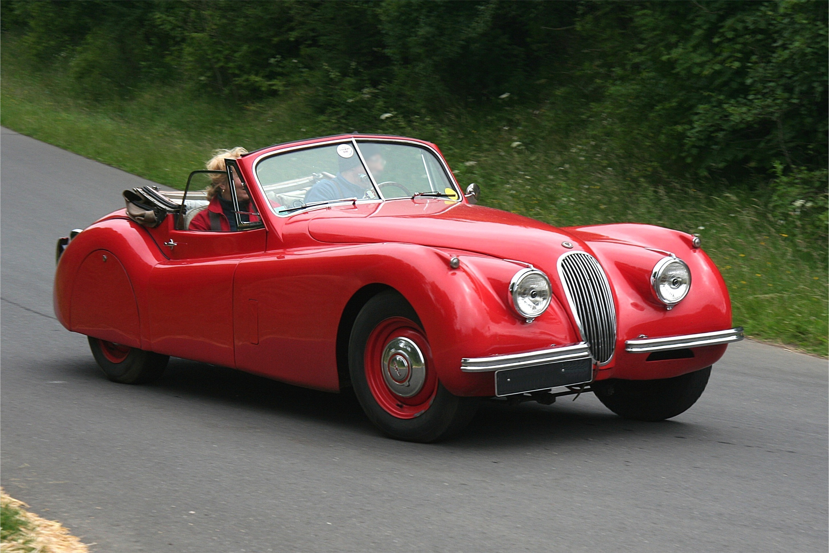 Jaguar XK 120 DHC, Baujahr 1953 (DAMC 05 Oldtimer Festival auf der alten Südschleife des Nürburgrings)